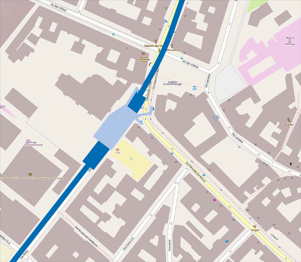 Mappa della stazione di Sant'Ambrogio della metropolitana di Milano.